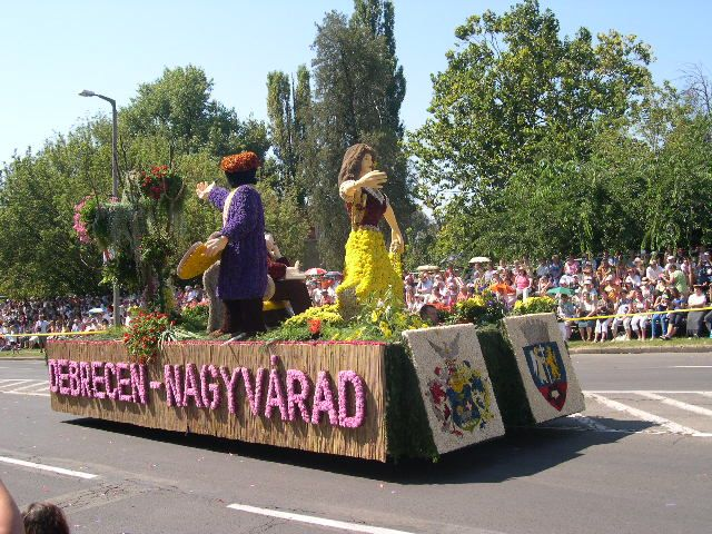 Testvérvárosok virágkompozíciója a 2008. évi Debreceni Virágkarneválon.